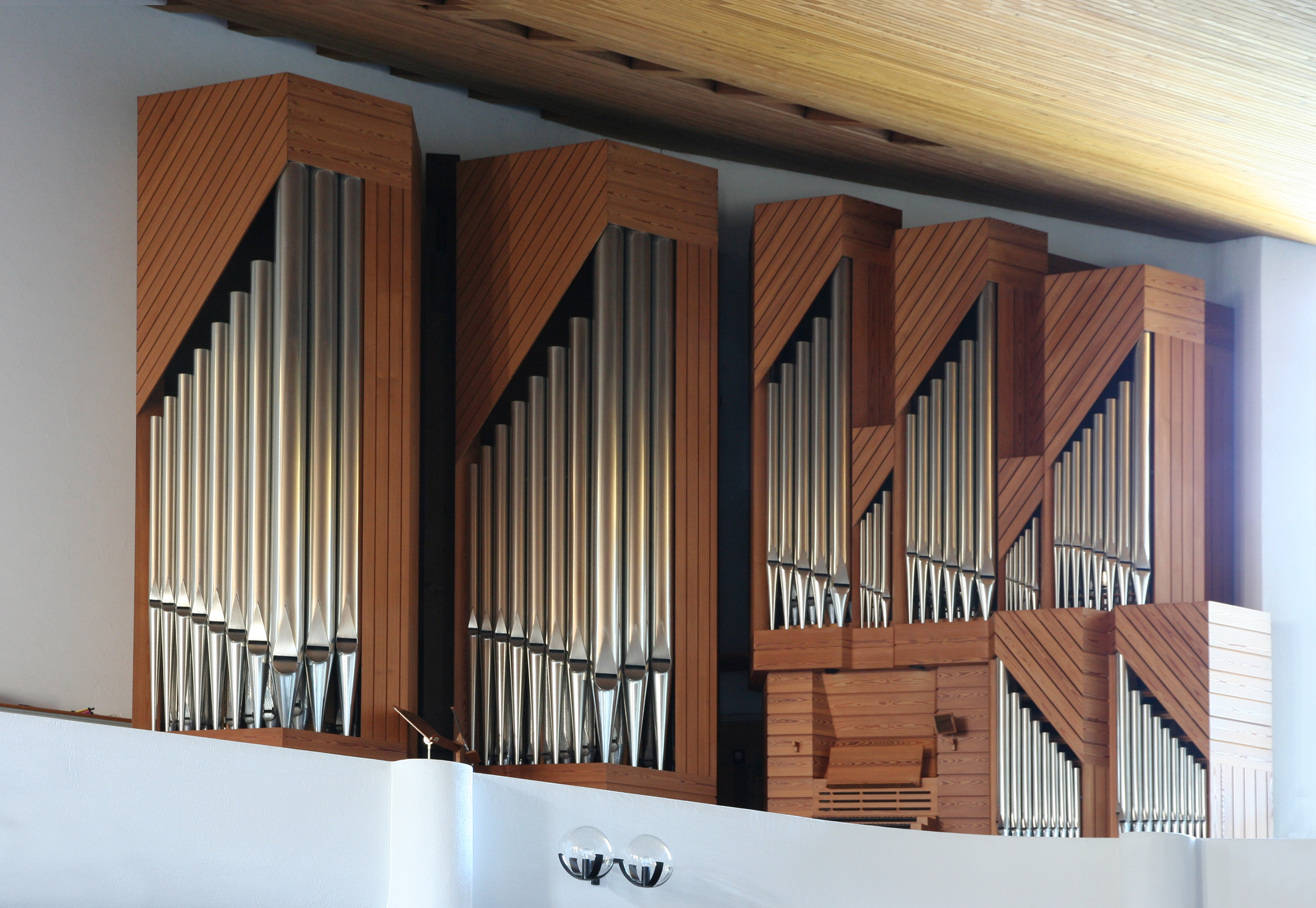 evang.-ref. Kirche Bischofszell TG